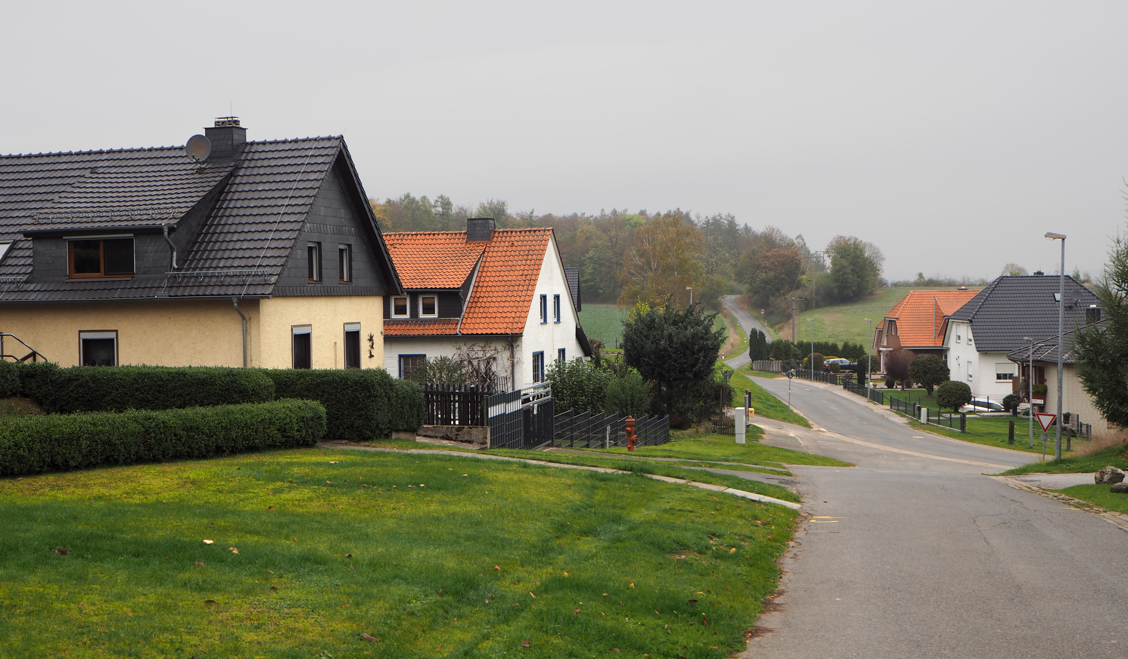 Clus (Bad Gandersheim) – Wohnbebauung – Foto 2019 Wohnhäuser, die nach dem Zweiten Weltkrieg westlich des Gestüts entstanden.